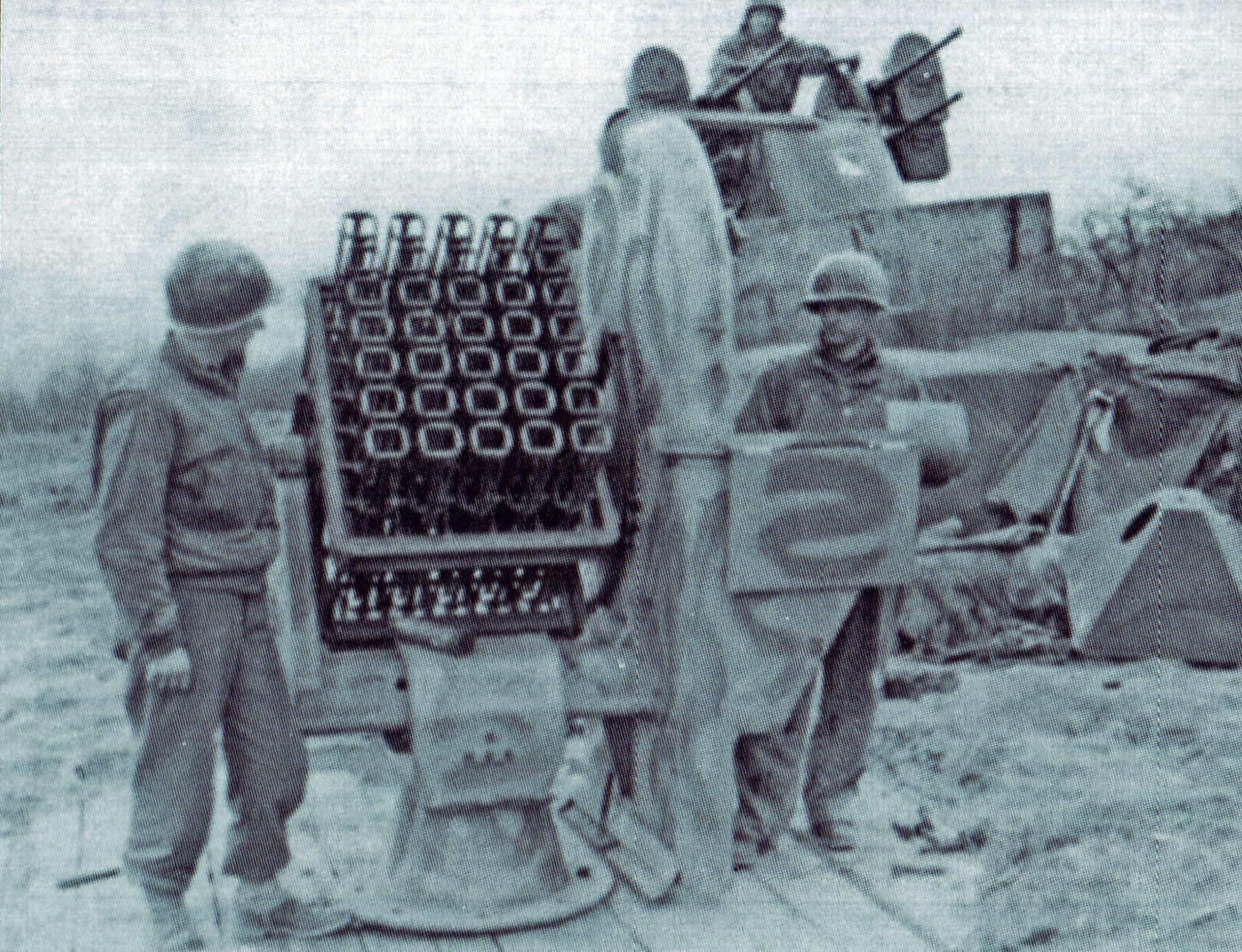 Von US-amerikanischen Truppen bei Remagen erbeutetes Föhn-Gerät (Mehrfach-Raketenwerfer).